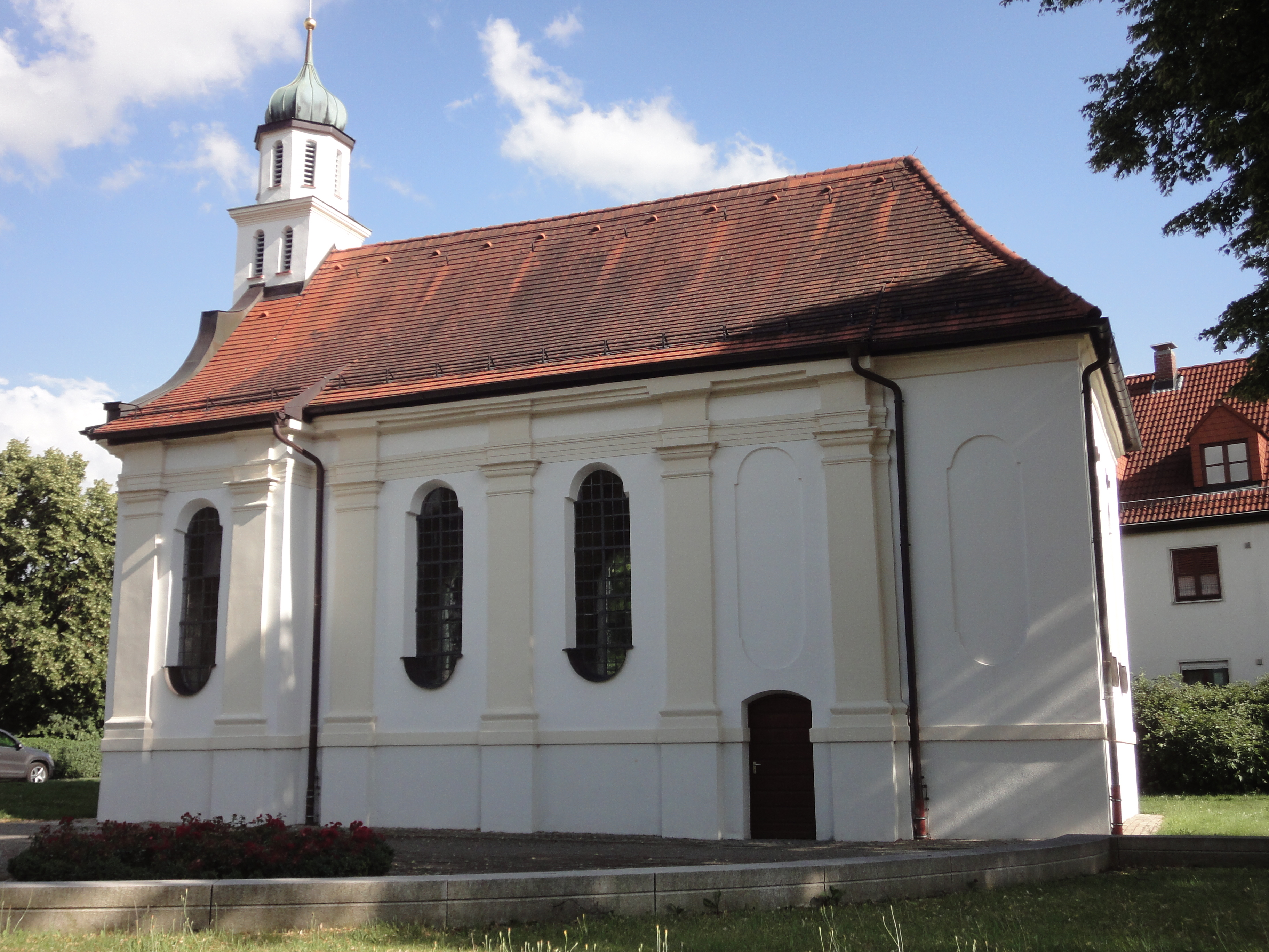 Kapelle St. Emmeran in Gersthofen von Norden, Abendaufnahme